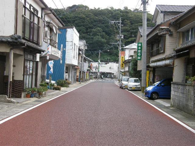 長崎県道152号田平港線全景